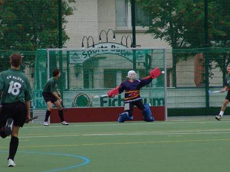 Szene aus einem Feldhockeyspiel in Deutschland